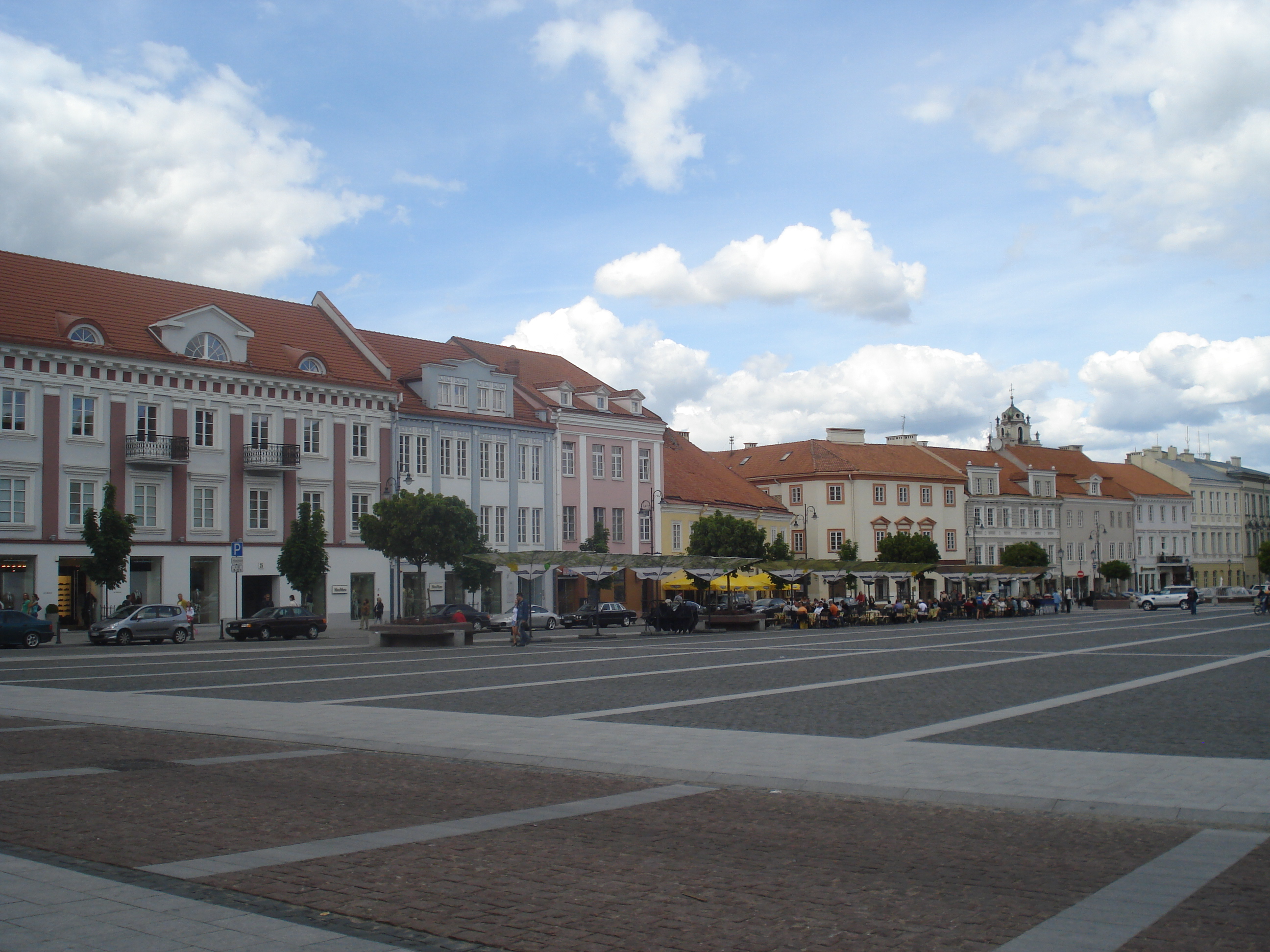 Town hall square in Vilnius after renovation. Rekonstruota Vilniaus Rotušės aikštė